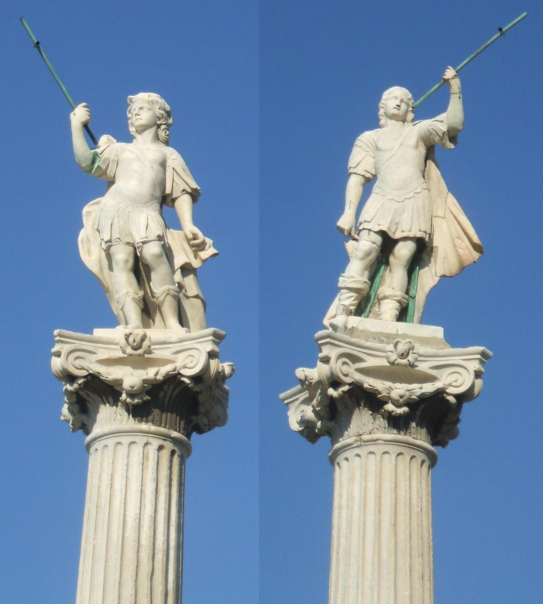 Cádiz